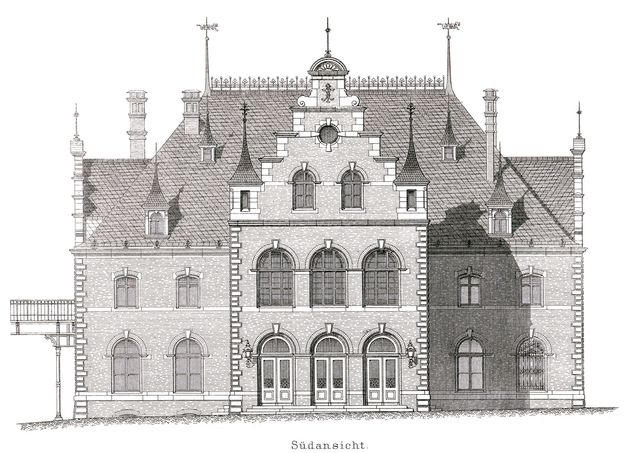 Berlin – Berlin Bahnhof Westend, Ansicht Südansicht des Bahnhofs, Entwurf von Kaiser & Großheim